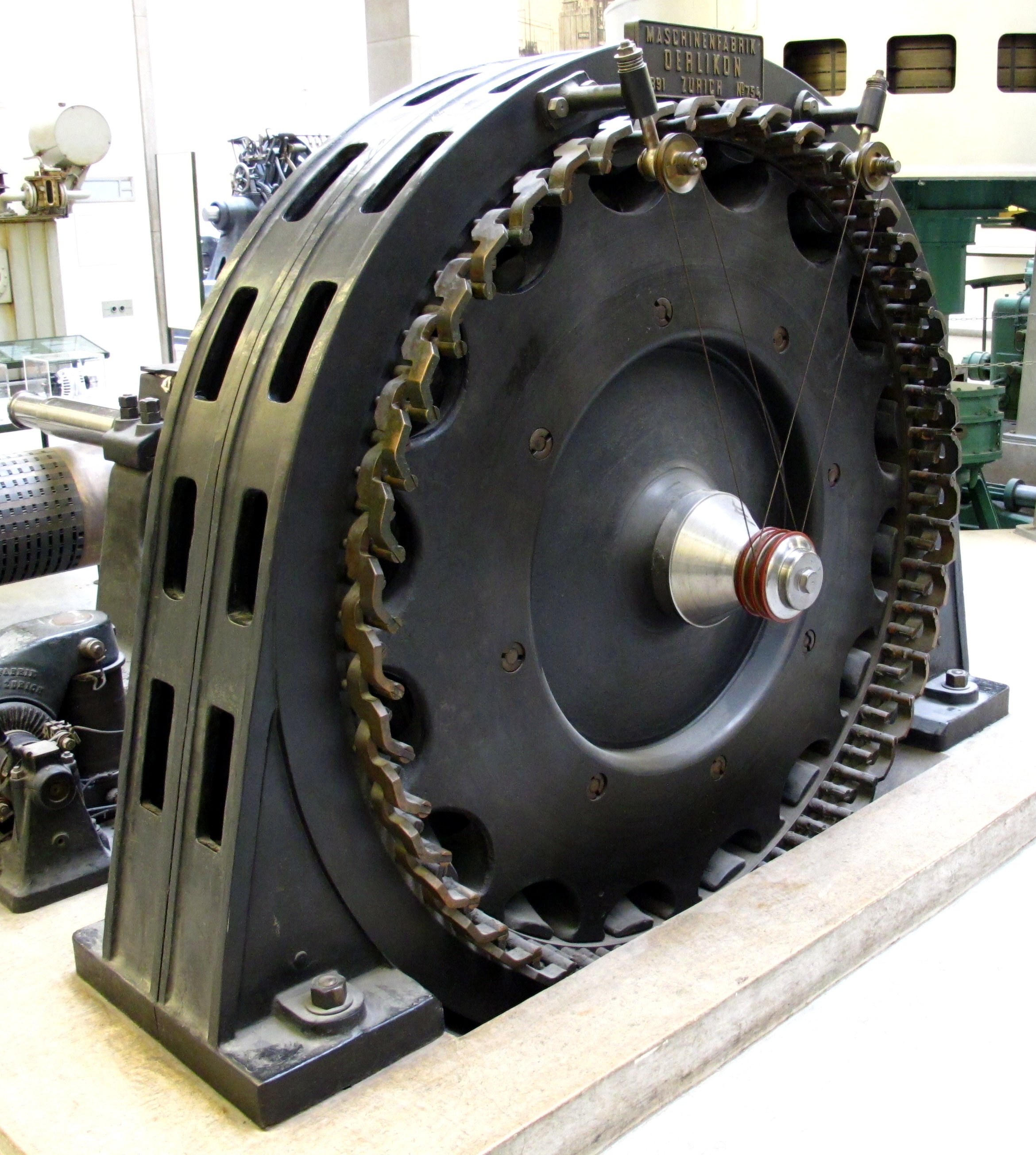 Frühere Drehstrommaschine der Drehstromübertragung Lauffen–Frankfurt. Hersteller: Maschinenfabrik Oerlikon (Zürich, Schweiz) Leistung: 220 kW (300 PS) Sternspannung: 55 V (Ständerwicklung, Spannung Aussenleiter gegen Sternpunkt) Umdrehungen: 150 rpm Polanzahl: 48 (16 Tripel) Frequenz: 40 Hz Der Rotor mit Erregerspule bekam den Erregerstrom mittels zweier Kupferdrahtschlaufen und seilrollenförmigen Kontaktringen auf der zentrischen Achse (im Vordergrund) zugeleitet. Die Ständerwicklungen für Drehstrom, ausgeführt als Kupferstangen und mit Asbestrohren im Ständer isoliert, waren für 55 V und bei Vollast bei maximal 1400 A ausgelegt.